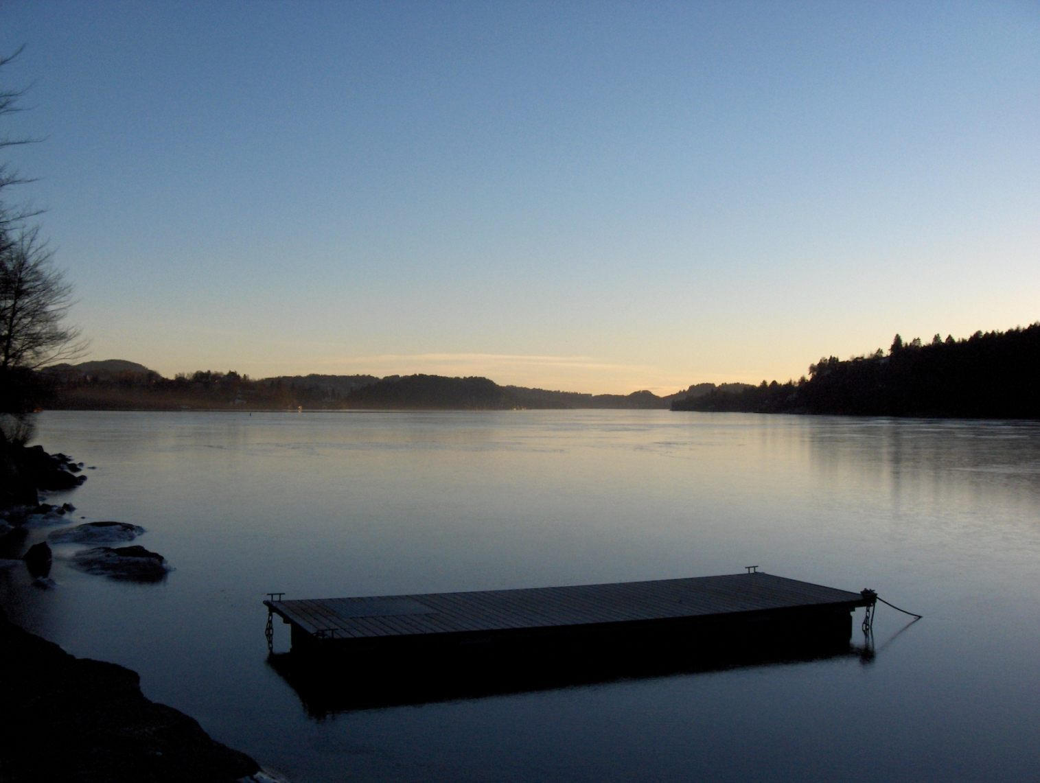 Nordåsvatnet, février 2006. Photo prise par moi même. Saty 3 novembre 2006 à 18:40 (CET)